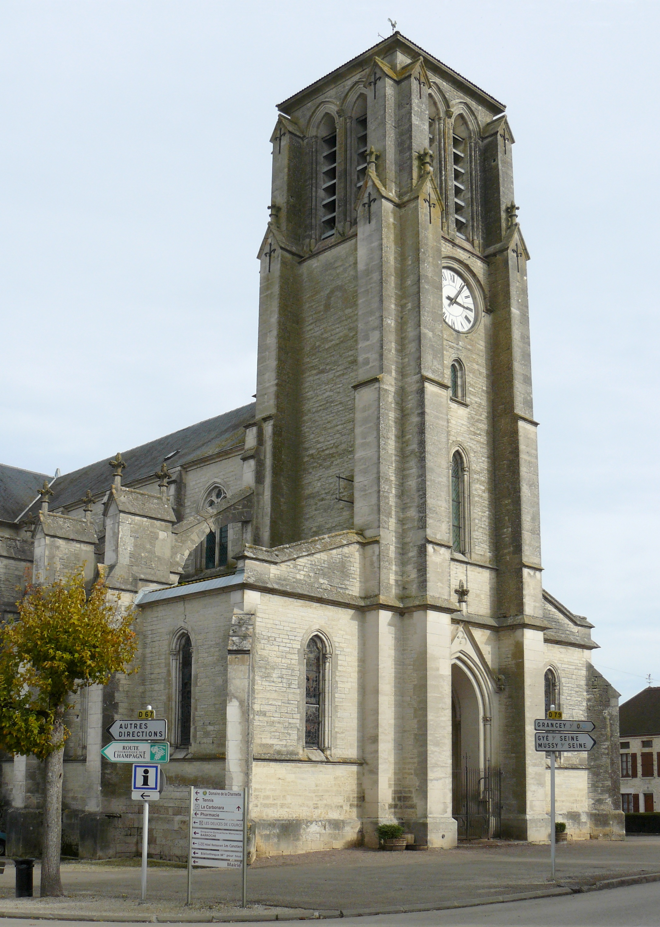 Église d'Essoyes (Aube, France), style néo-gothique (1865), portail principal.